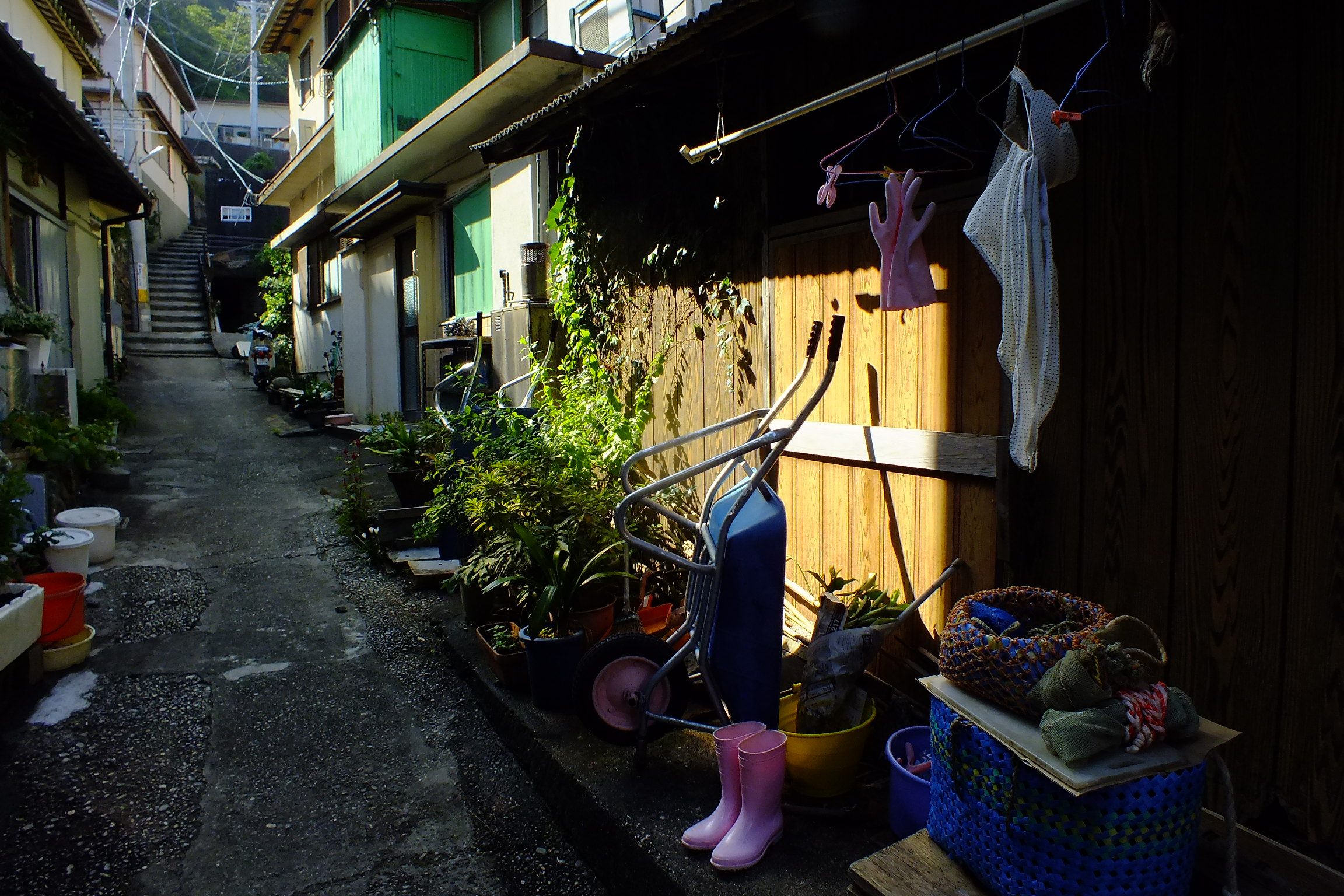 2016-08-05 Kami Island (Mie) 神島民家・路地